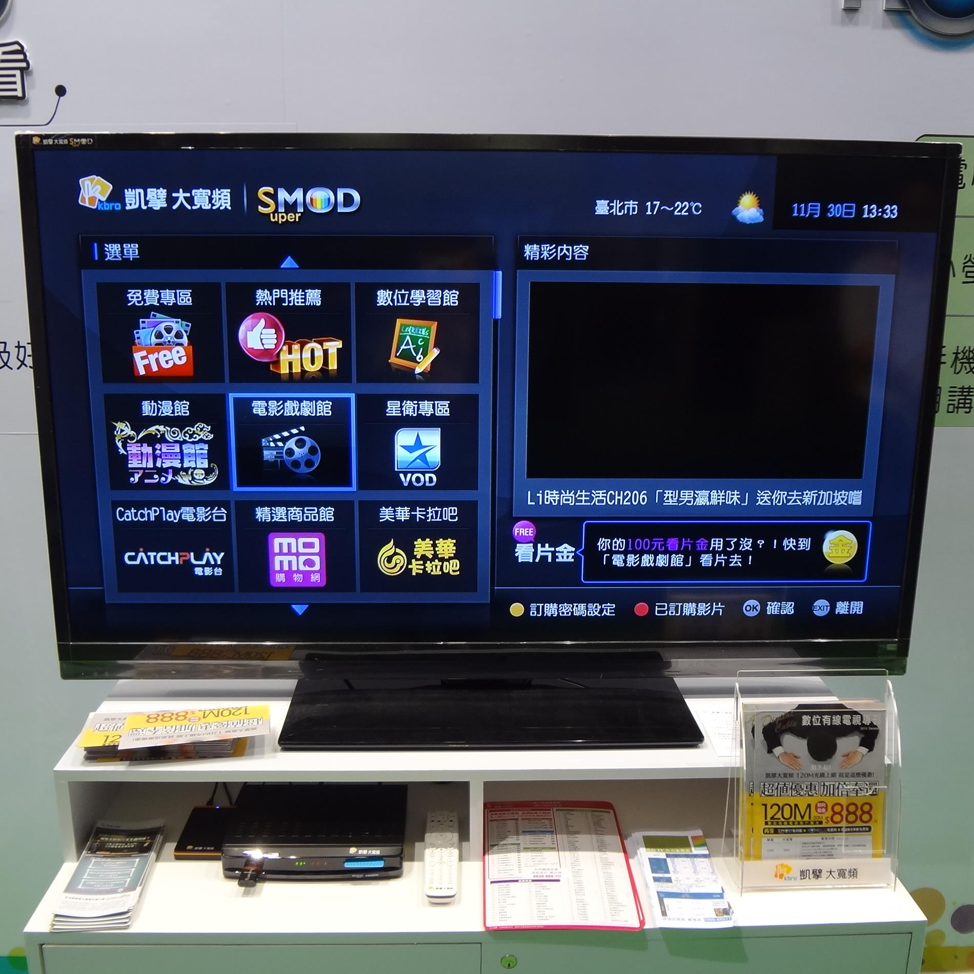 2013年資訊月，凱擘展示的SuperMOD